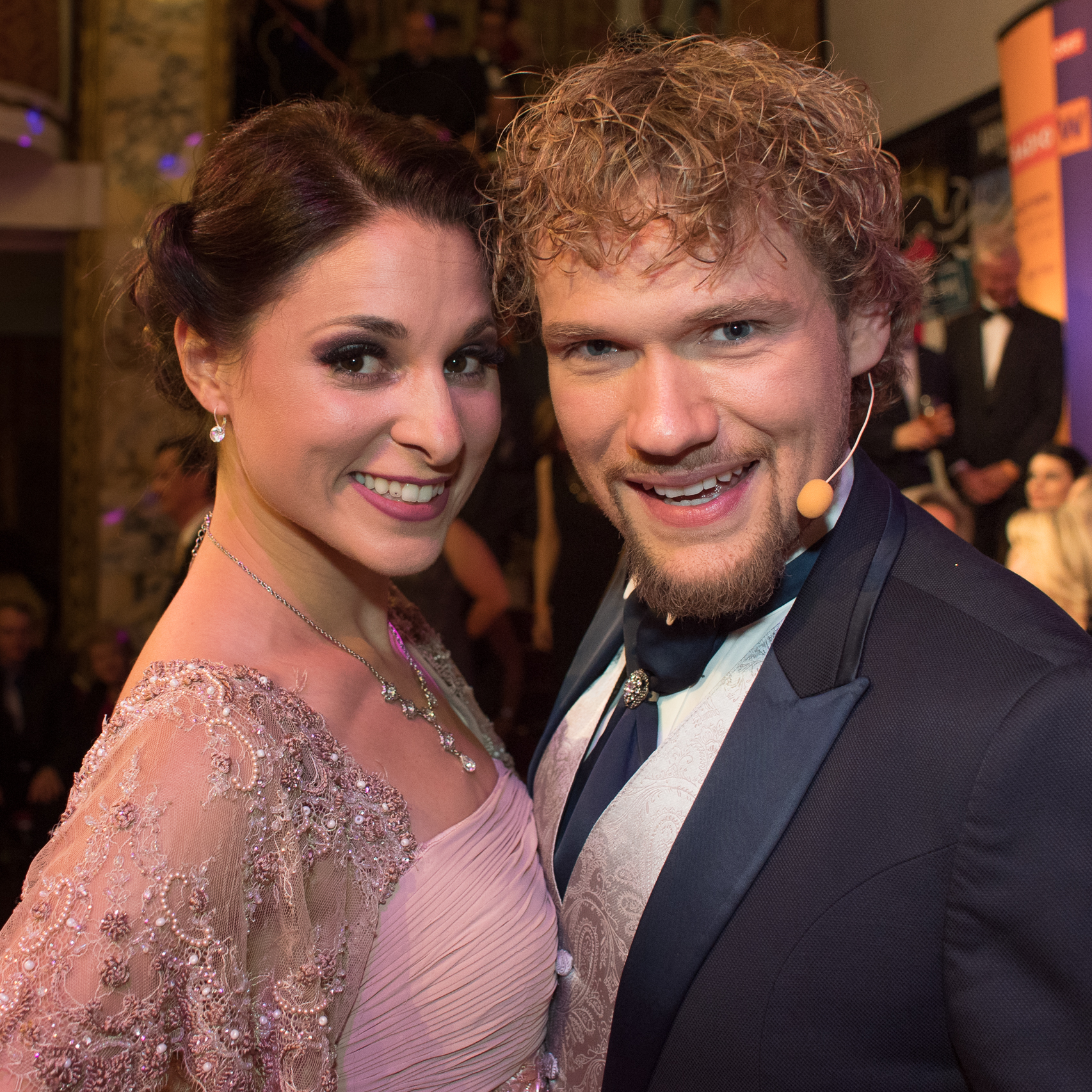 Radio Wien Dancing Stars Ball am 30. April 2017 im Parkhotel Schönbrunn. Bild zeigt Amélie van Tass und Thommy Ten.